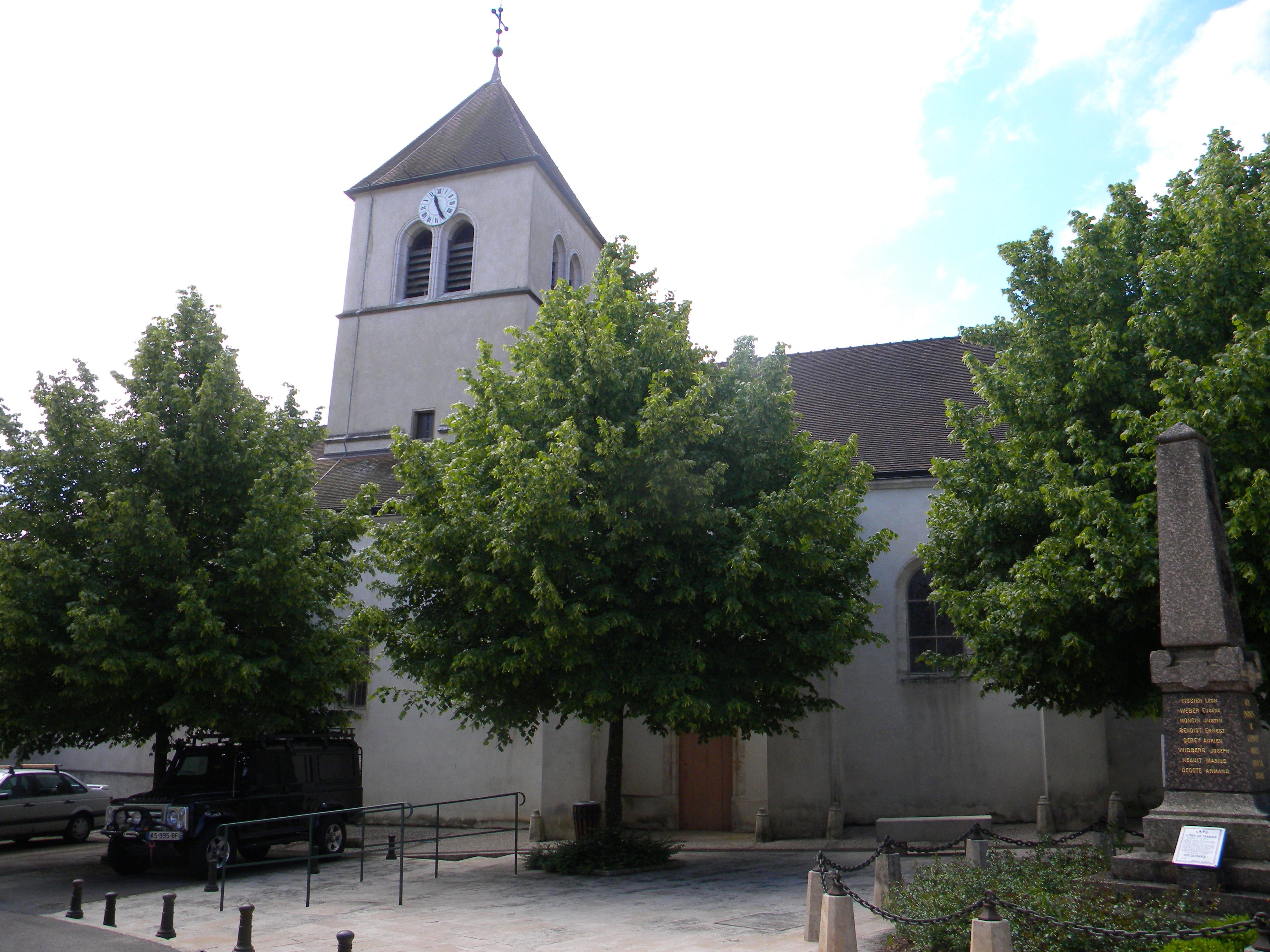 preĝejo